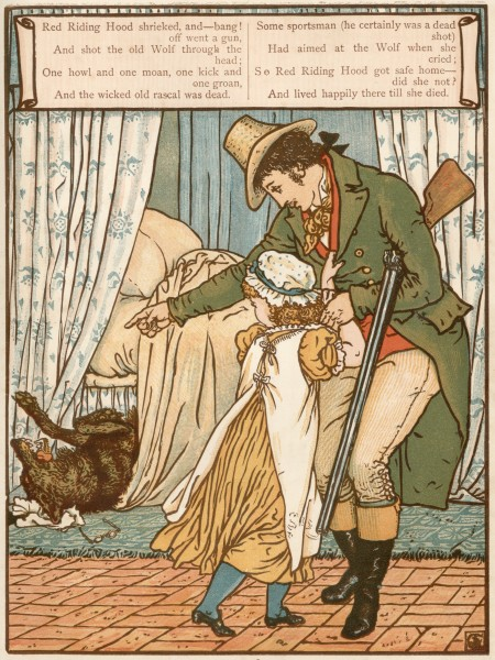 Гравюры по рисункам Крейна к сказкам «Синяя Борода», «Спящая Красавица», «Красная Шапочка», «Джек и бобовый стебель»